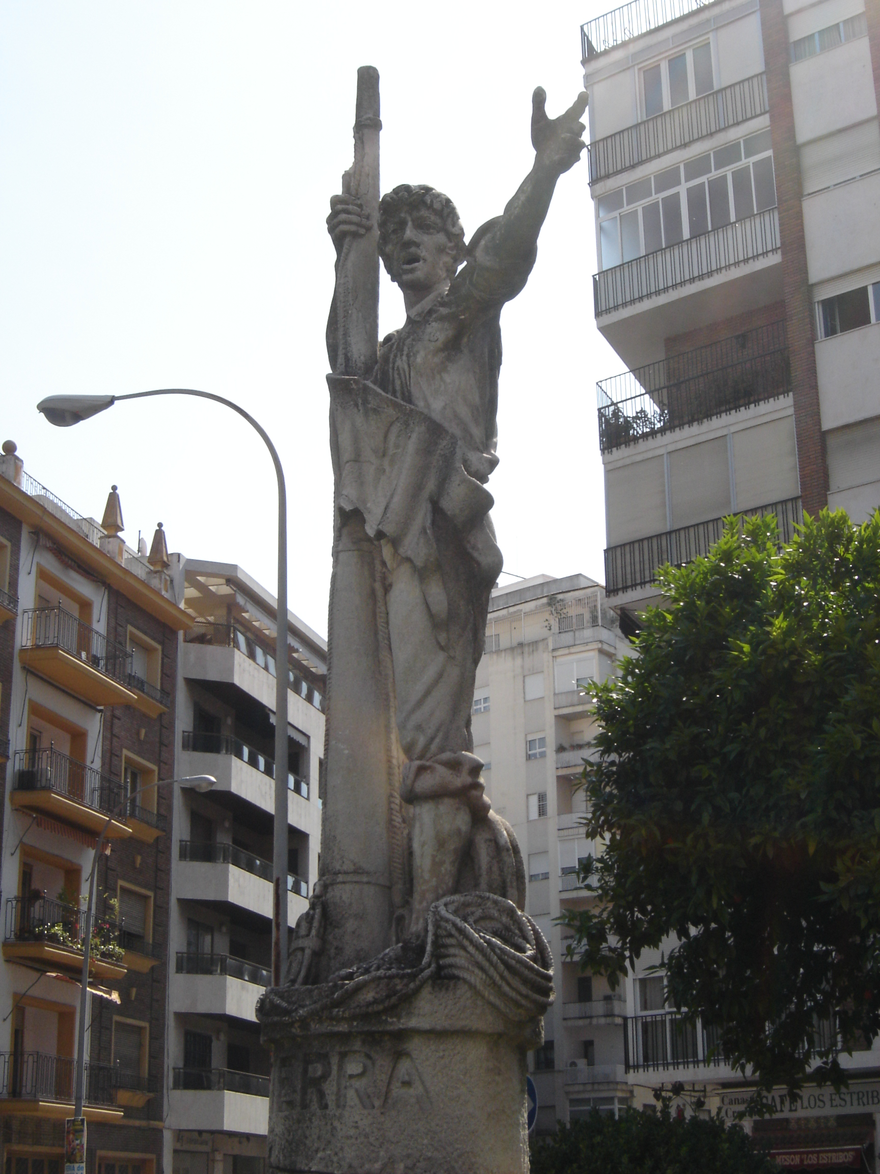 Monumento (en Sevilla) a Rodrigo de Triana, primer hombre en ver el Nuevo Mundo.